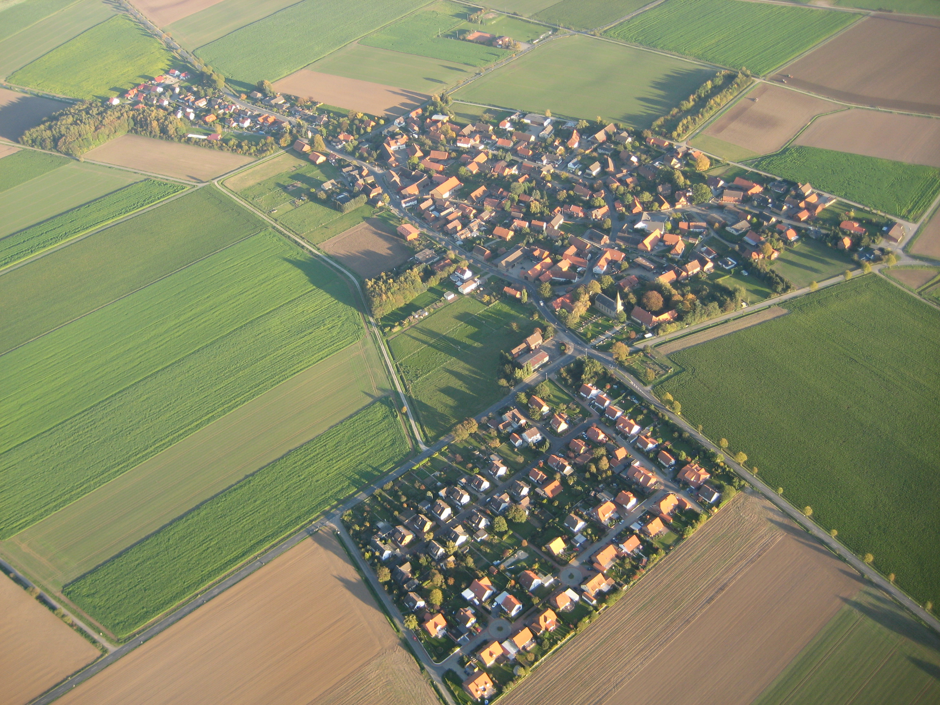 Luftbild von Barbecke, Gemeinde Lengede